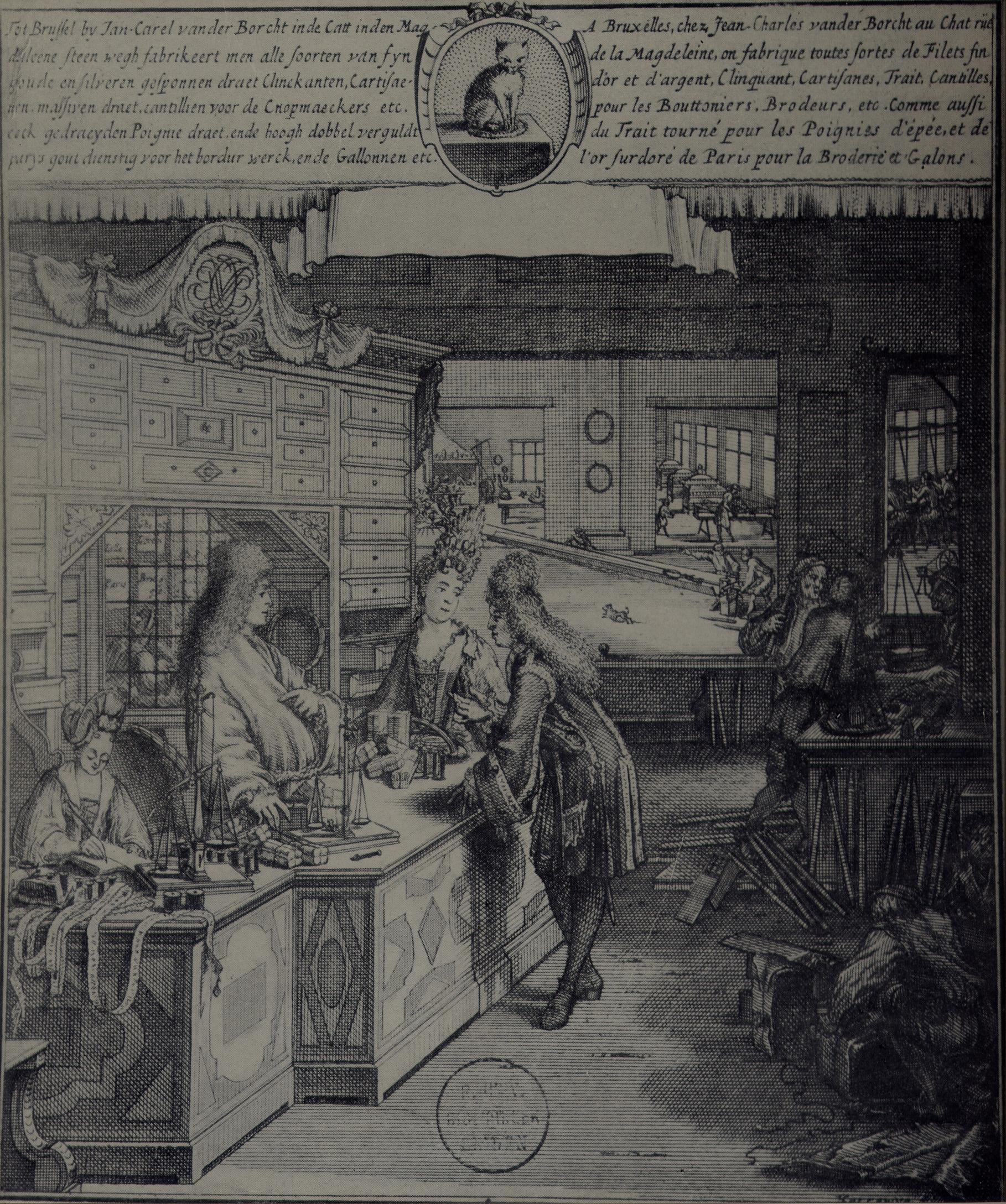 gravure représentant Jean-Charles van der Borcht, Conseiller et maître Général des Monnaies, représenté rue de la Madeleine, n° 59, à Bruxelles, dans sa manufacture de fils d'or et d'argent. Il naquit à Bruxelles le 22 novembre 1668 et mourut le 4 mai 1735, assassiné d'un coup de canne donné par un inconnu, alors qu'il rentrait du Salut aux Capucins. Il est le frère du poète néo-latin Petrus van der Borcht (Petrus à Castro).